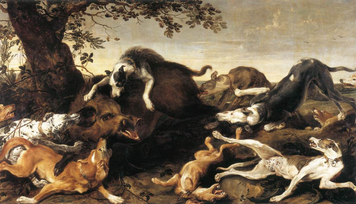 Boarhunt